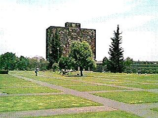 Biblioteca Central con murales de Juán O'Gorman. Biblioteca Central con murales de Juán O'Gorman. En CU.